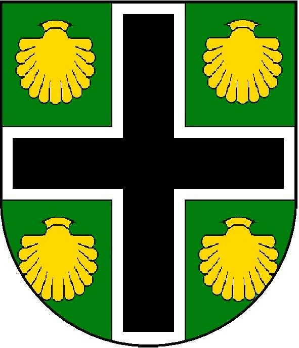 Brasao da Família Abasto